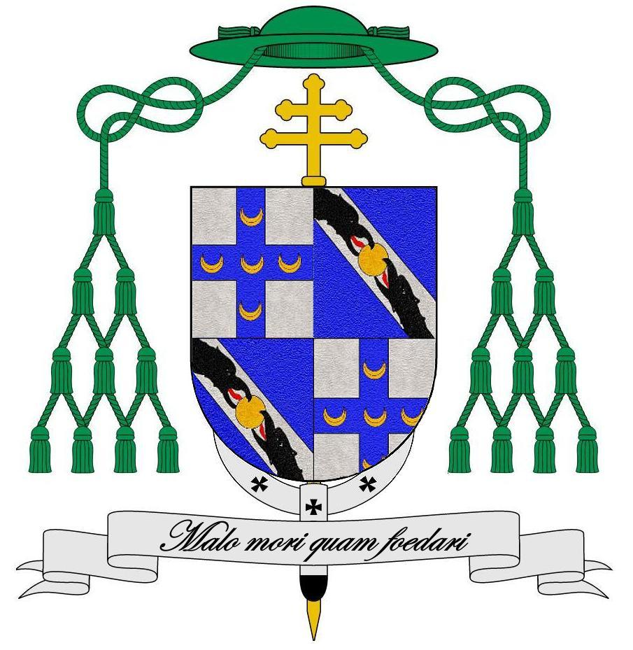 Stemma e Ornamenti dell'Arcivescovo Francesco Bandini Piccolomini